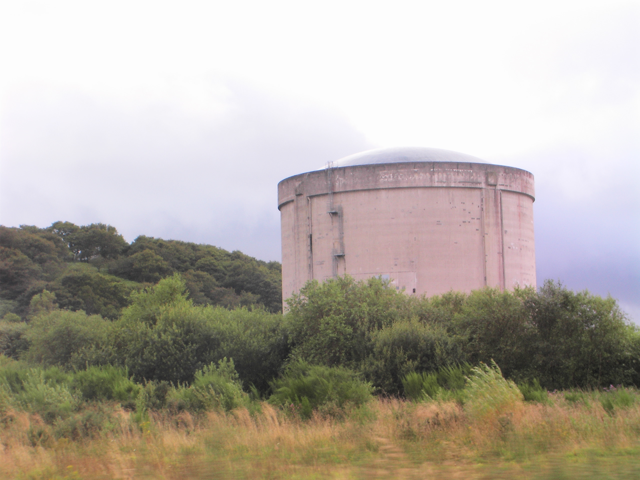 Site nucléaire de Brennilis